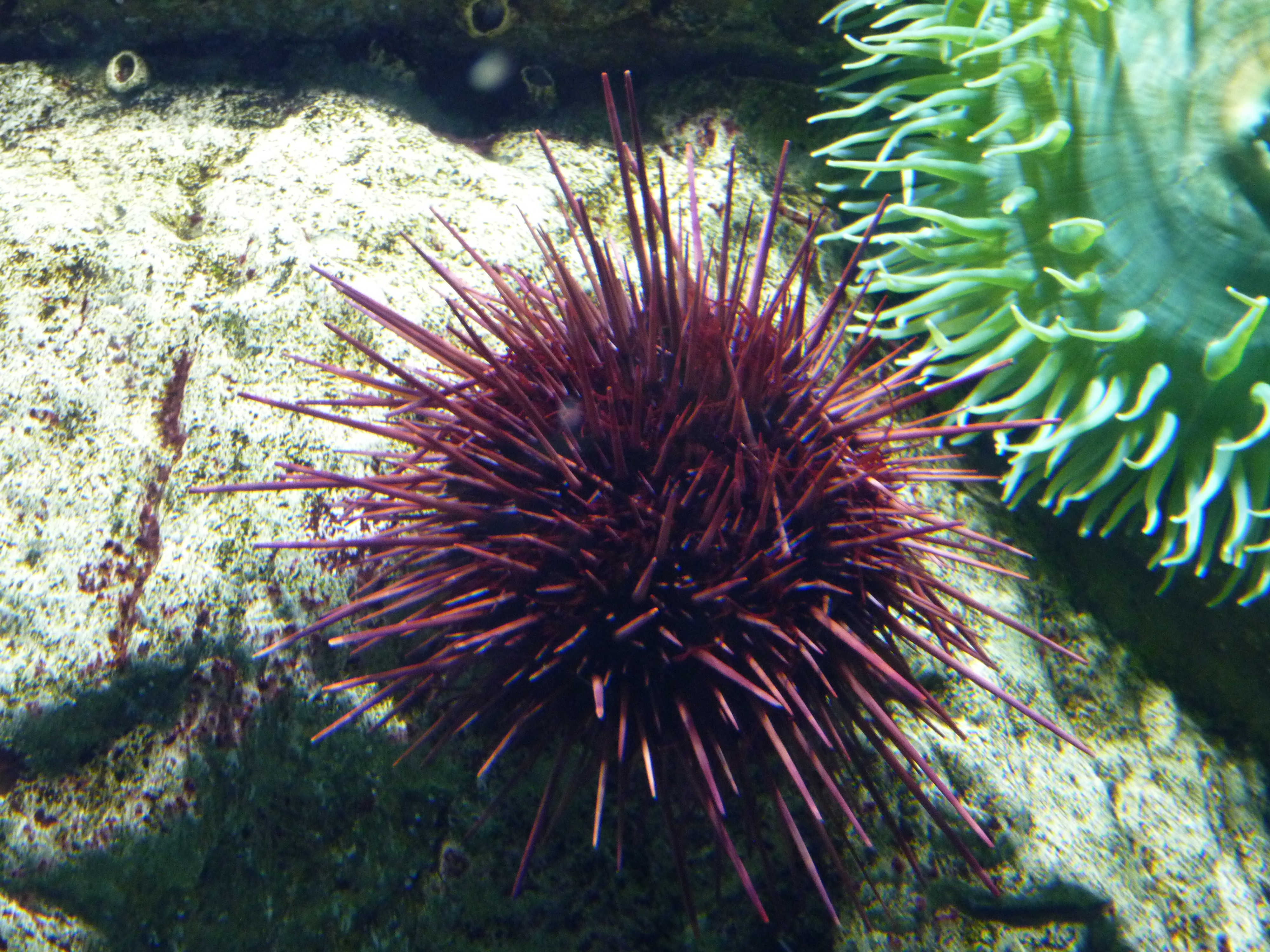 Oceanário de Lisboa